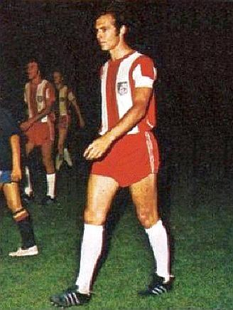 Franz Beckenbauer en 1973 - Campioni dello Sport 1973-1974, n°110.